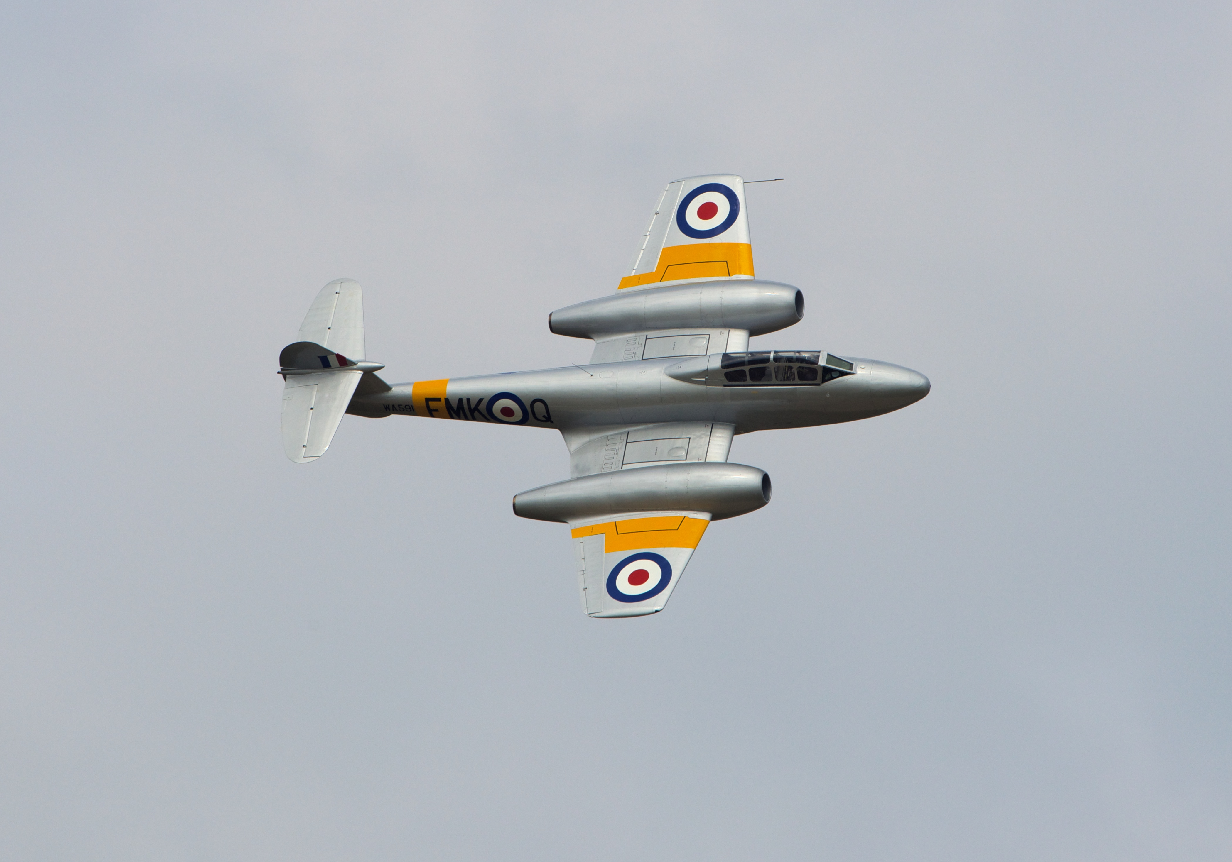 Gloster Meteor T.7